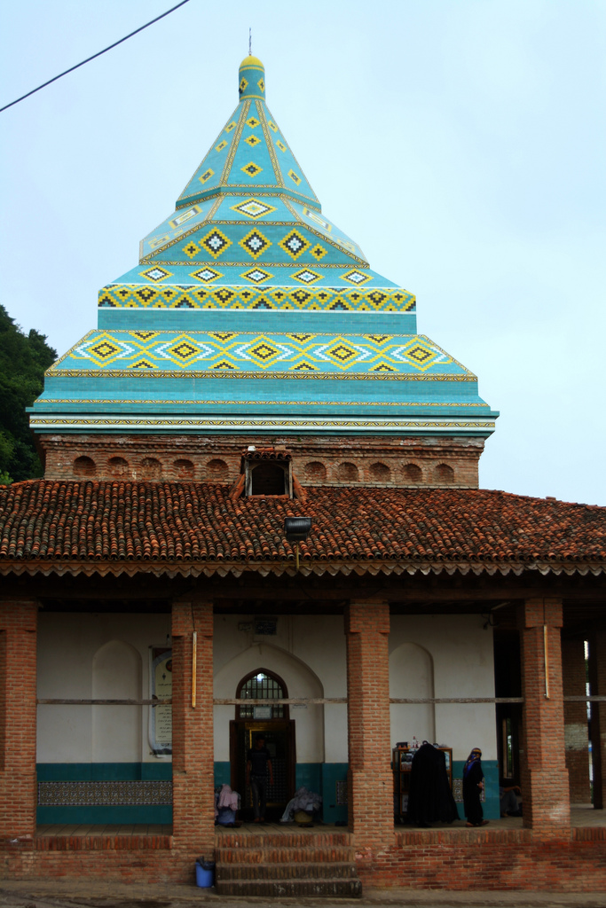 Sheikh Zahed Gilani Mausoleum, Lahijan, Iran